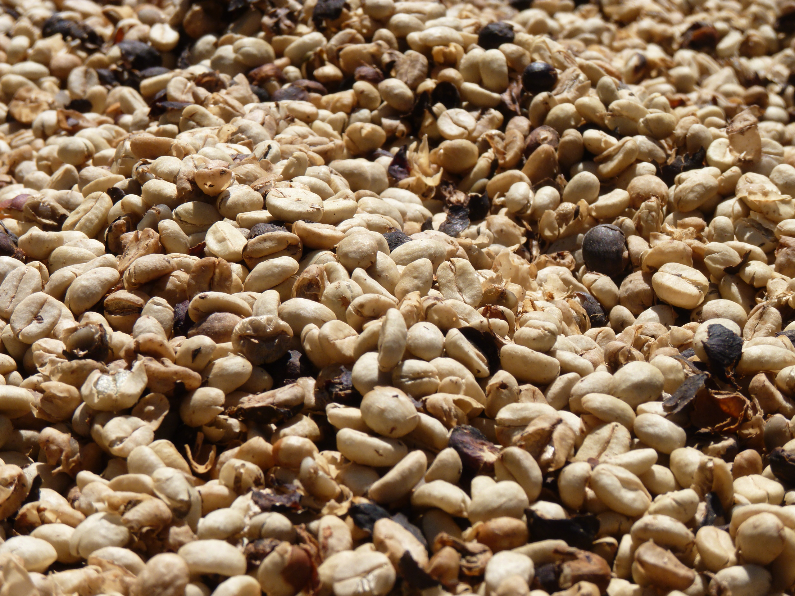 Granos de café secando al sol, después de ser lavados. Estos son pasos del proceso al que es sometido el fruto que se obtiene de la planta de café para lograr el producto final que es café tostado y molido que es comercializado en distintas partes del mundo